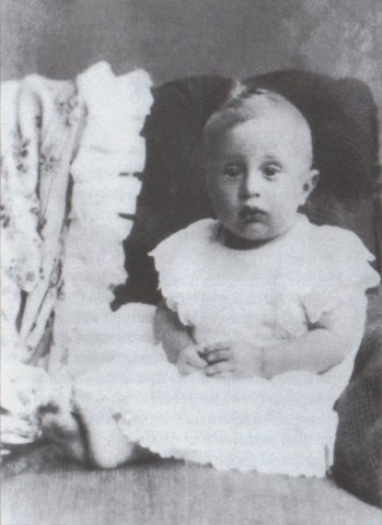 Багратион-Мухранский, Теймураз Константинович